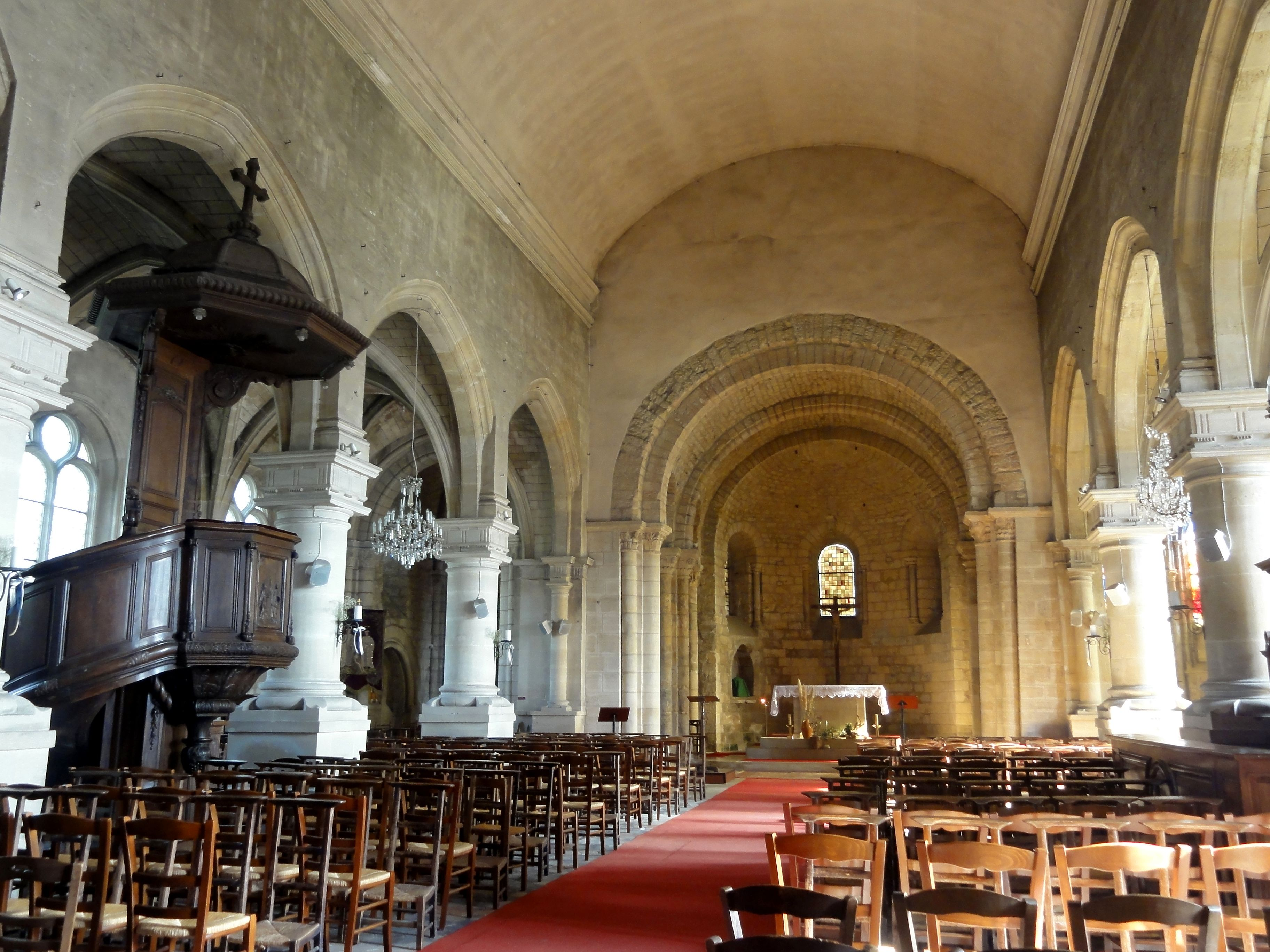 Nef, vue vers l'est.